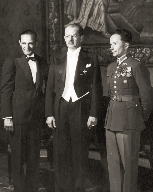 Oryginalny podpis pod zdjęciem: Zwycięzcy Challenge'u kpt. Bajan i płk. Płonczyński u P. Premjera Kozłowskiego.